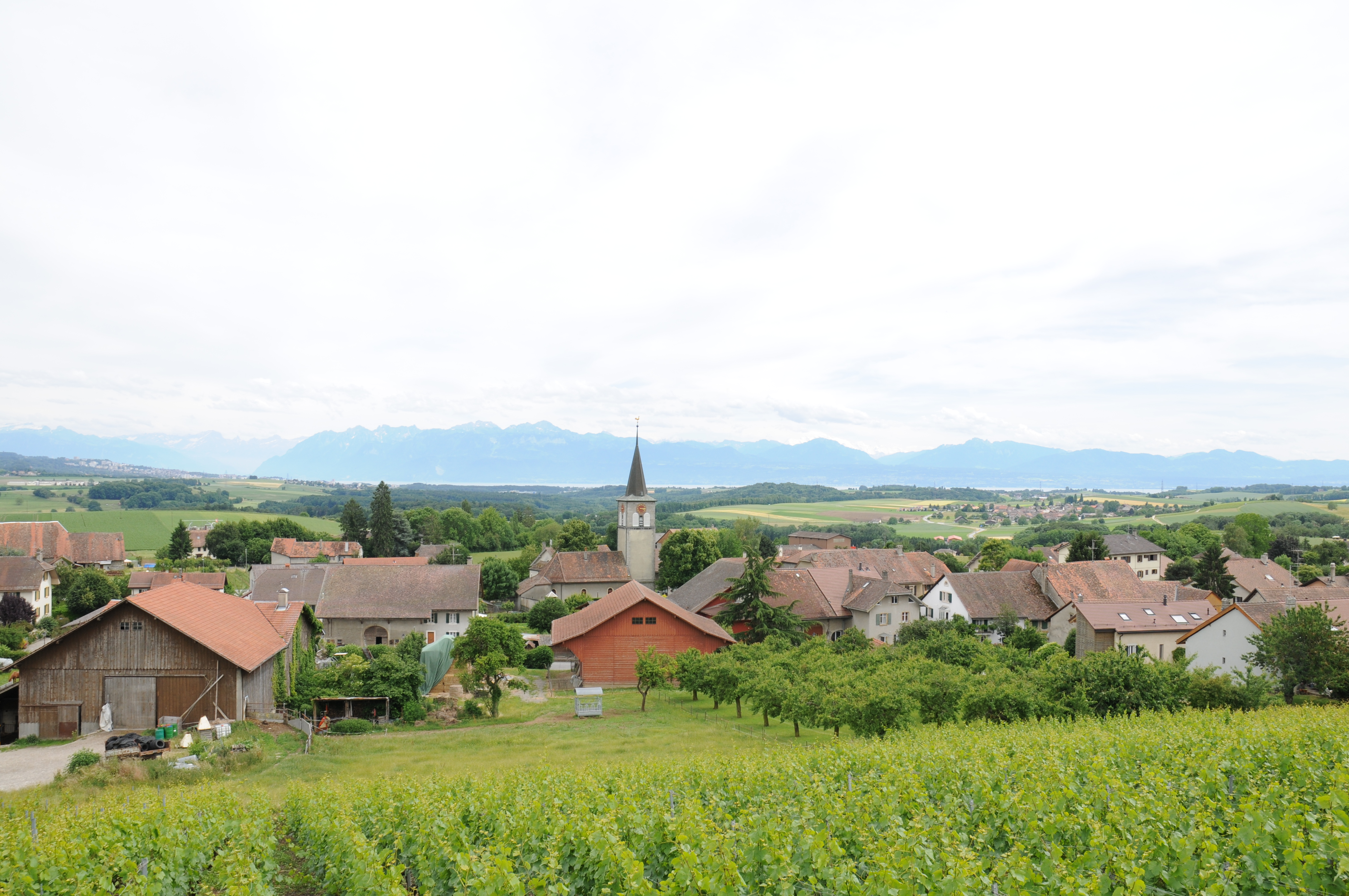 Village de Gollion (Suisse), vue vers le sud-est.